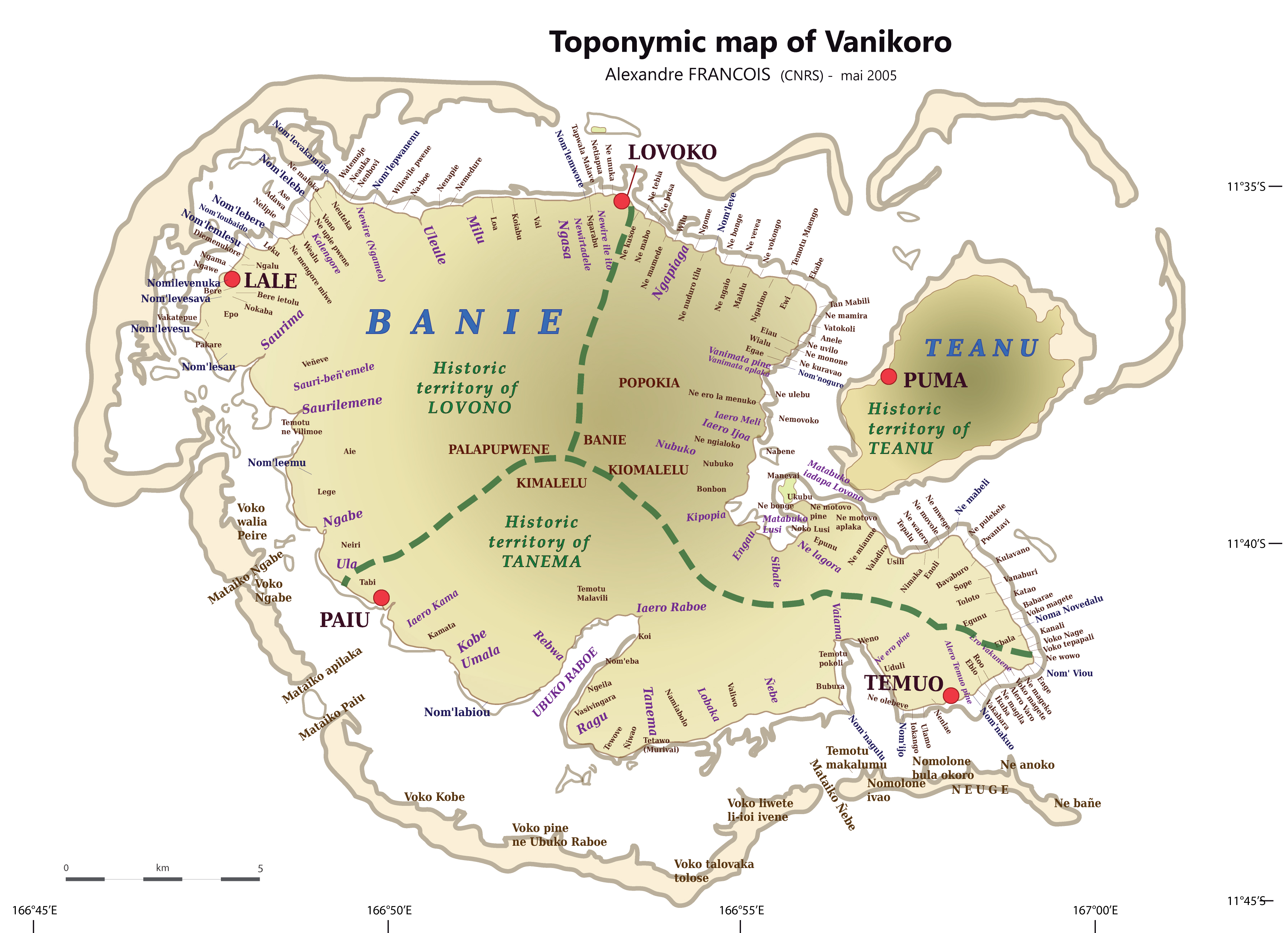 Alexandre François, Toponymie traditionnelle de Vanikoro, expédition Lapérouse 2005.